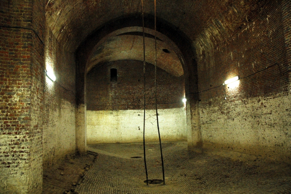 Een ondergrondse ijskelder op de gronden van de VUB, Waversesteenweg, Oudergem